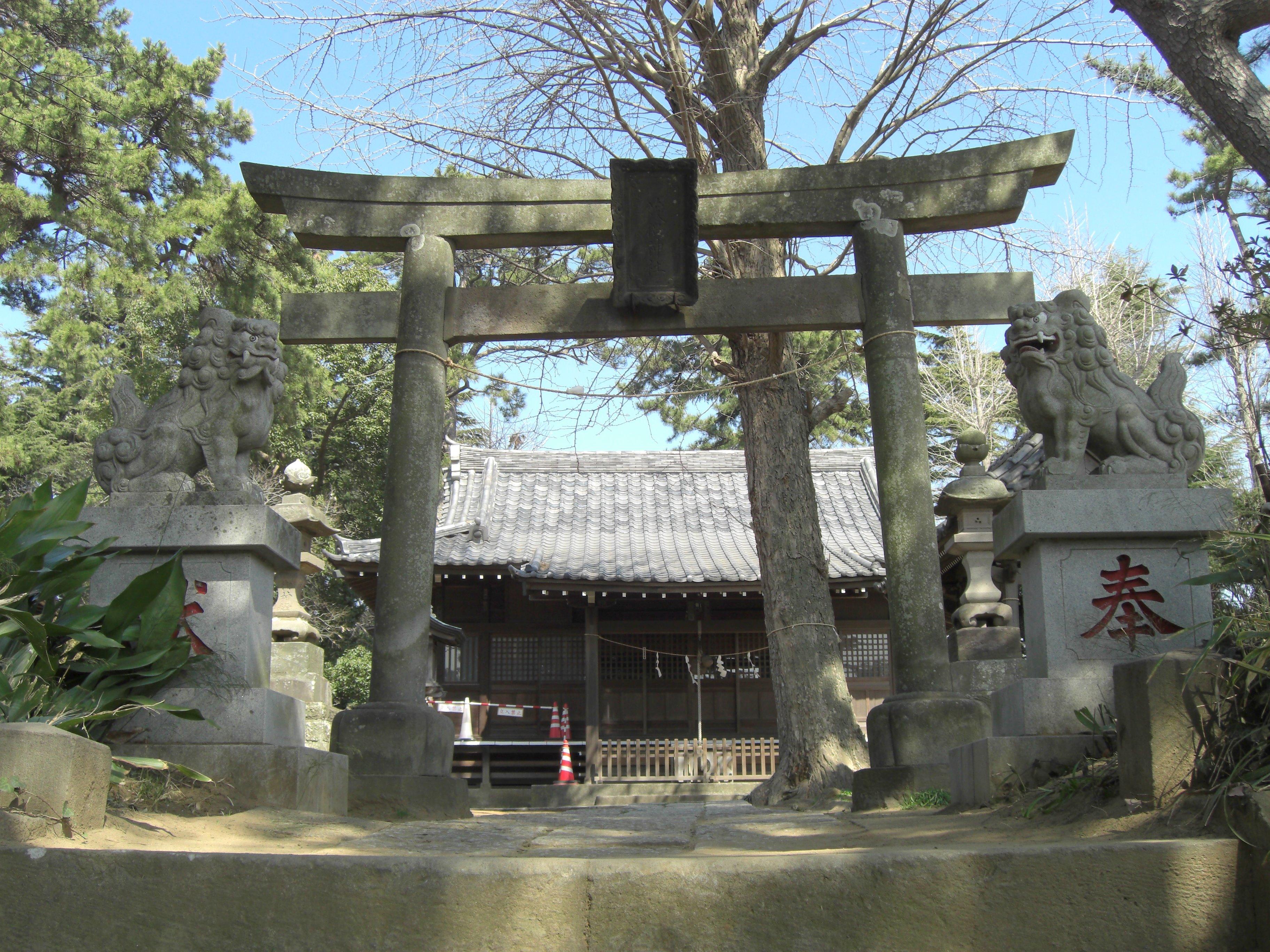 茂侶神社（船橋市東船橋7-20-1）